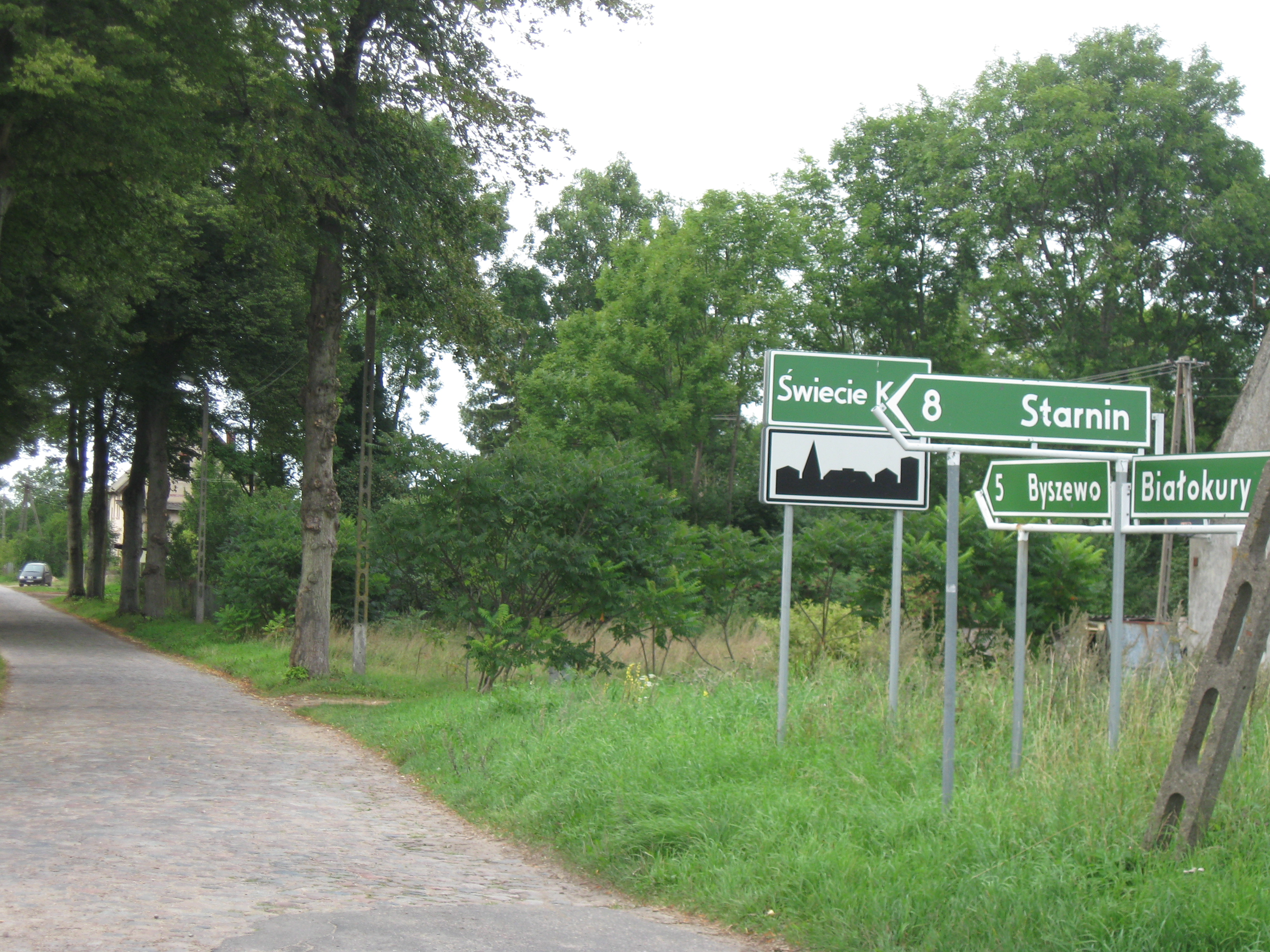 Skrzyżowanie dróg ze Starnina, Byszewa i Białokur w Świeciu Kołobrzeskim